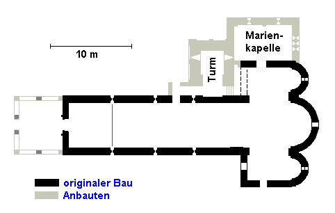 Saccargia